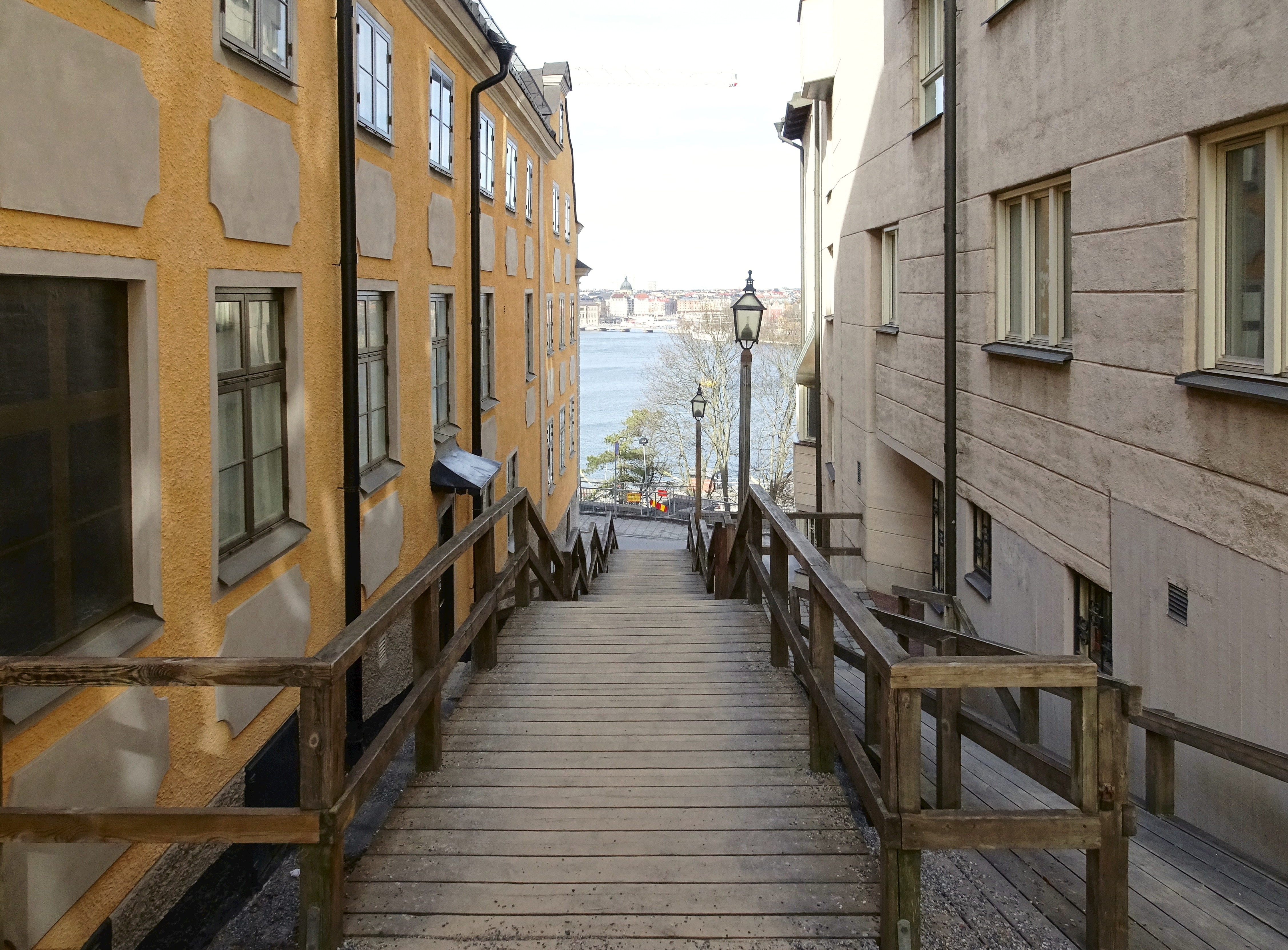 Elias Kuhlmans hus, från Katarina kyrkobacke